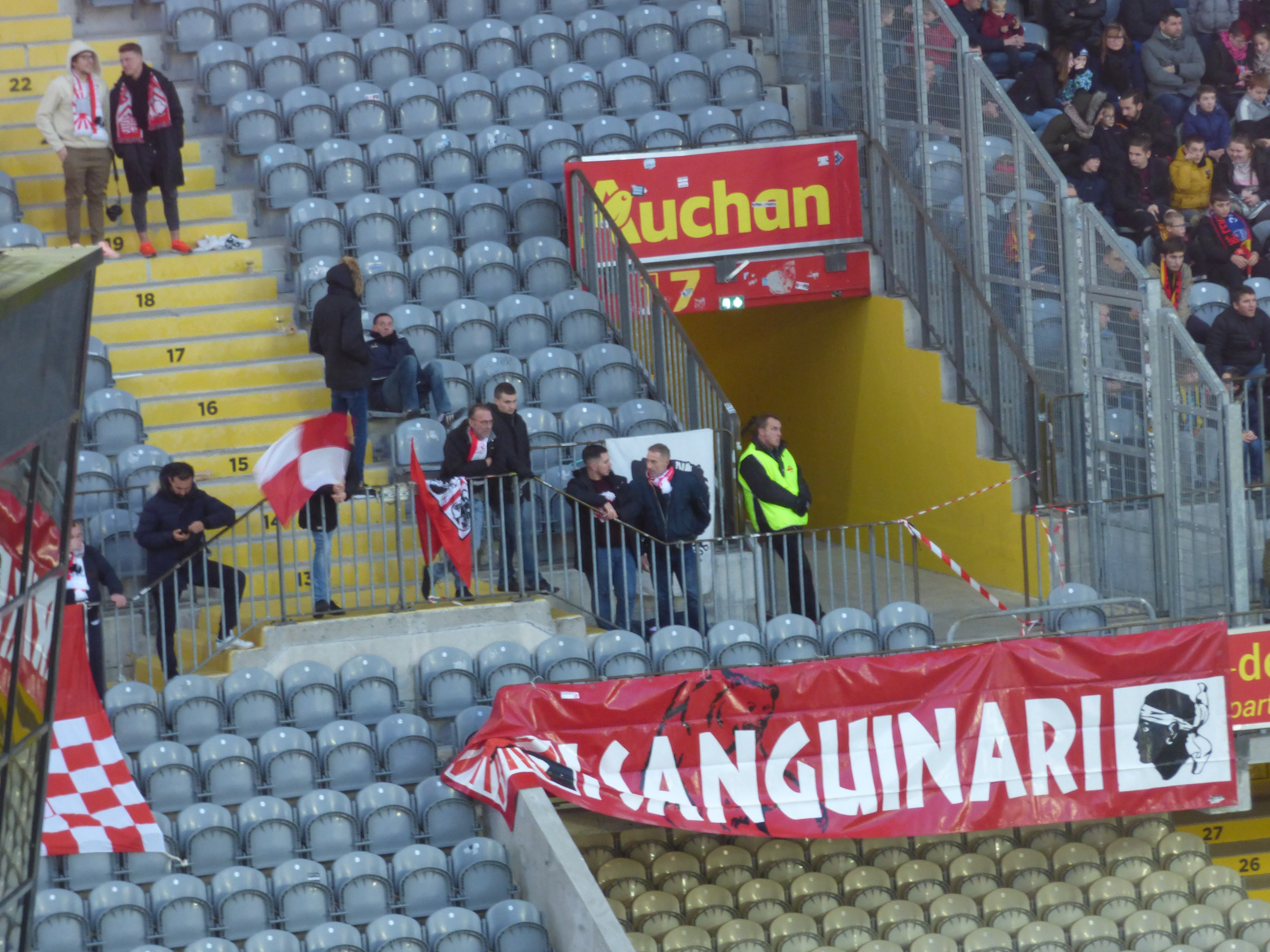 Supporters de l'AC Ajaccio pendant le match RC Lens - AC Ajaccio, comptant pour la dix-neuvième journée du championnat de France de Ligue 2 2018-2019, le 22 décembre 2018, au Stade Bollaert-Delelis de Lens.